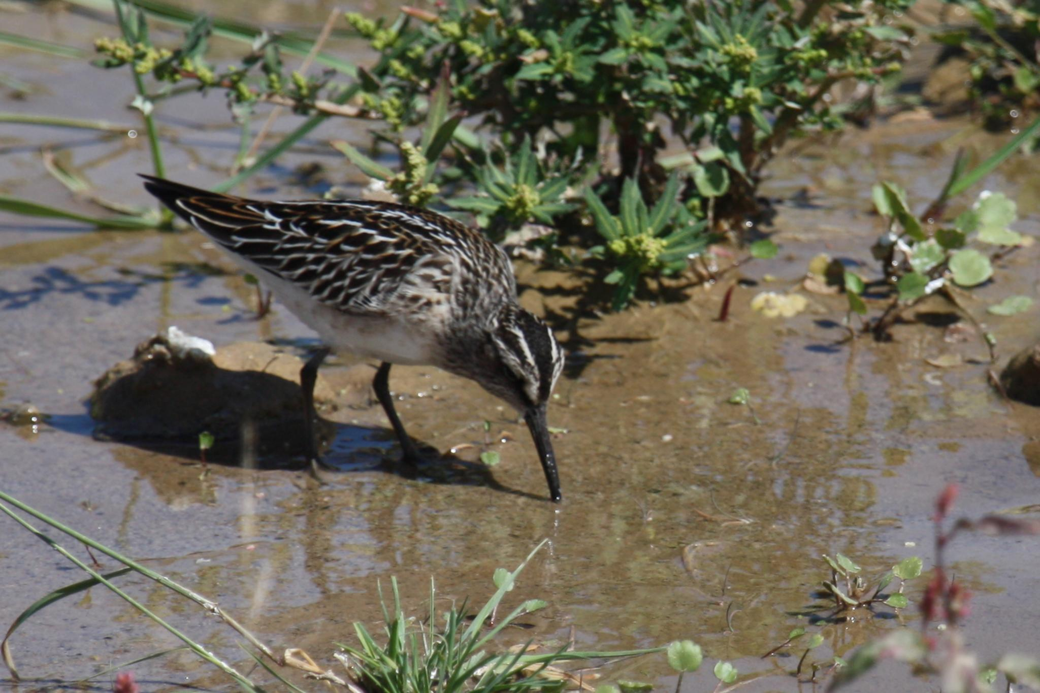 A juvenile eastern Broad-billed Sandpiper Limicola falcinellus sibirica on migration. Gobi, Mongolia.